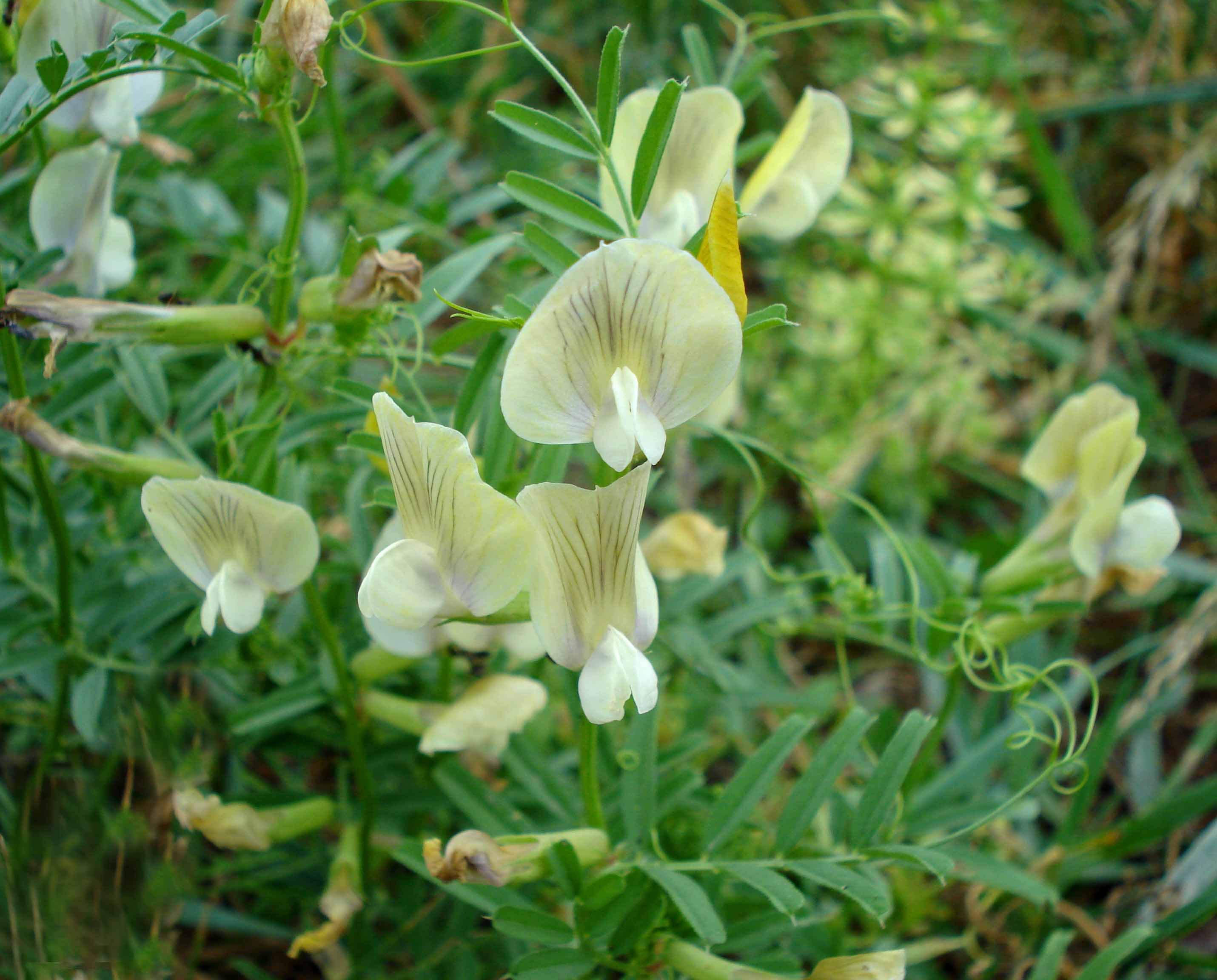 Vicia grandiflora (Unterfranken, Germany)